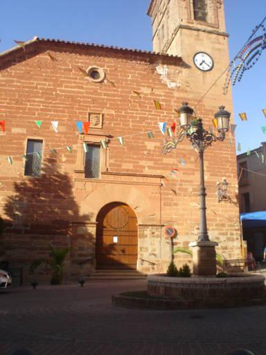 Fachada de la Iglesia de San Miguel Arcángel vista por la Plaza Mayor (Vilches, Jaén)